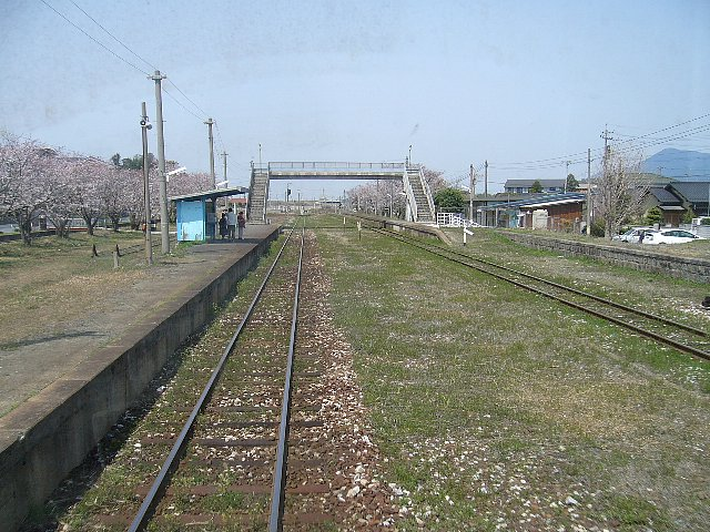 平成筑豊鉄道田川線 糒駅構内 直方行き車内から 2006年3月 Bakkai撮影